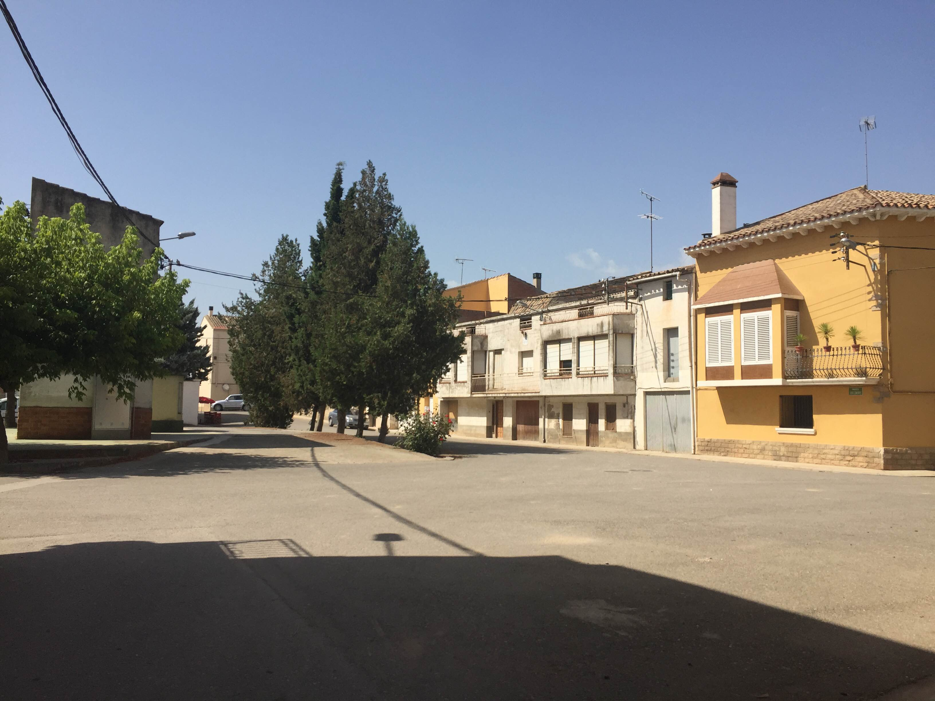 El Tarròs